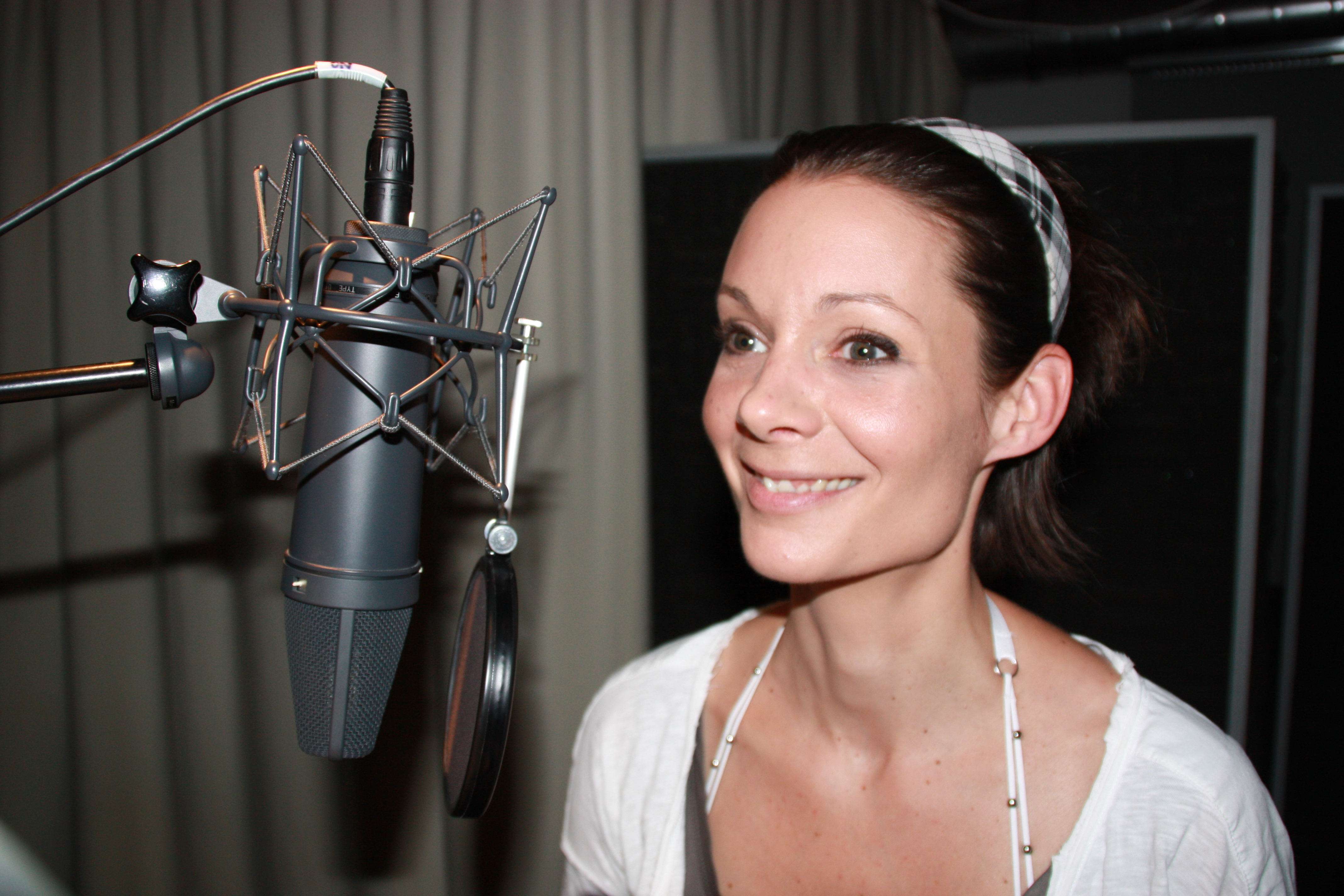 Natascha Geisler während einer Aufnahme im Synchronatelier